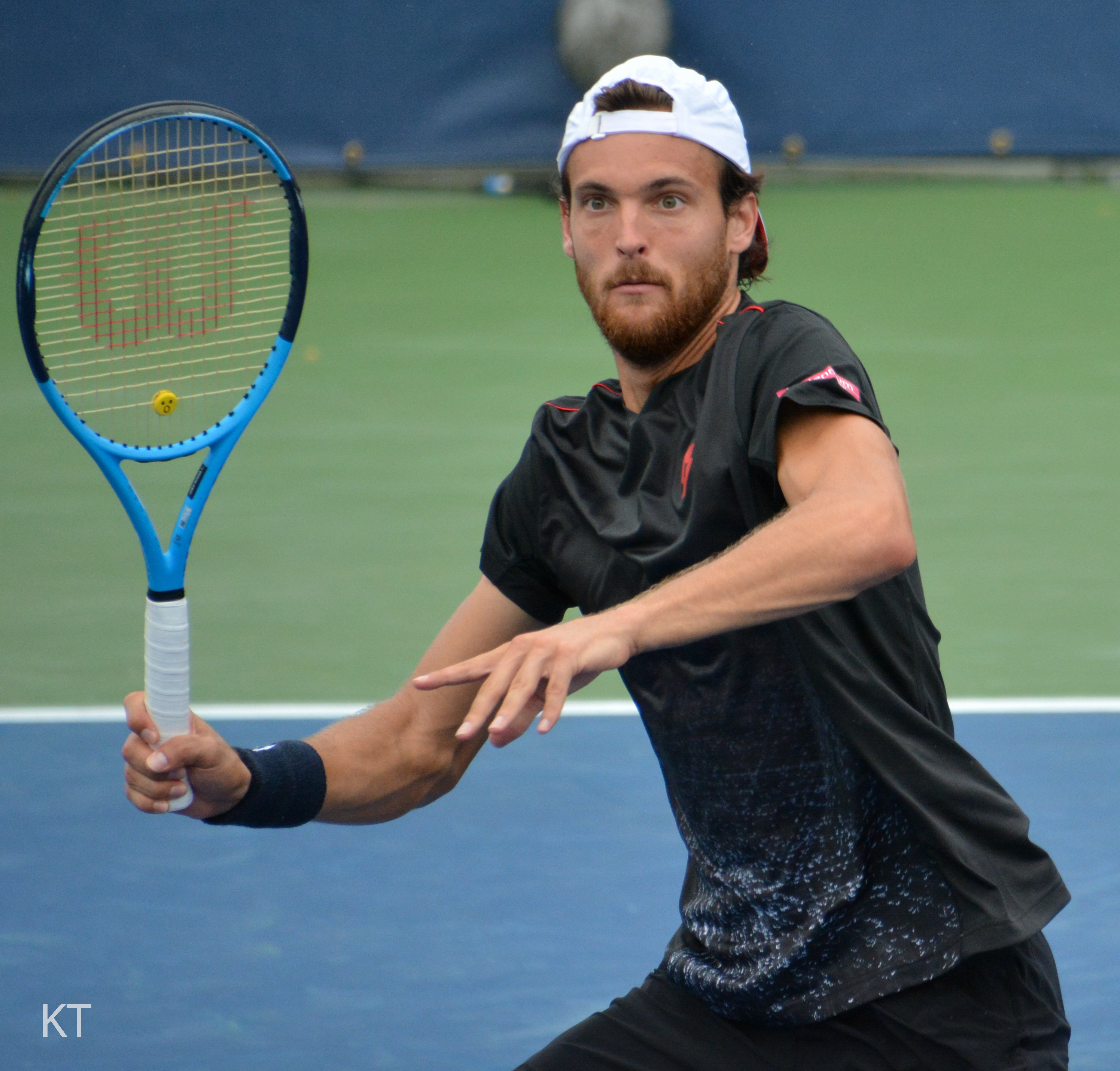 Joao Sousa & Leo Mayer v Nikola Mektic & Jurgen Melzer. Day 5 of US Open 2018.